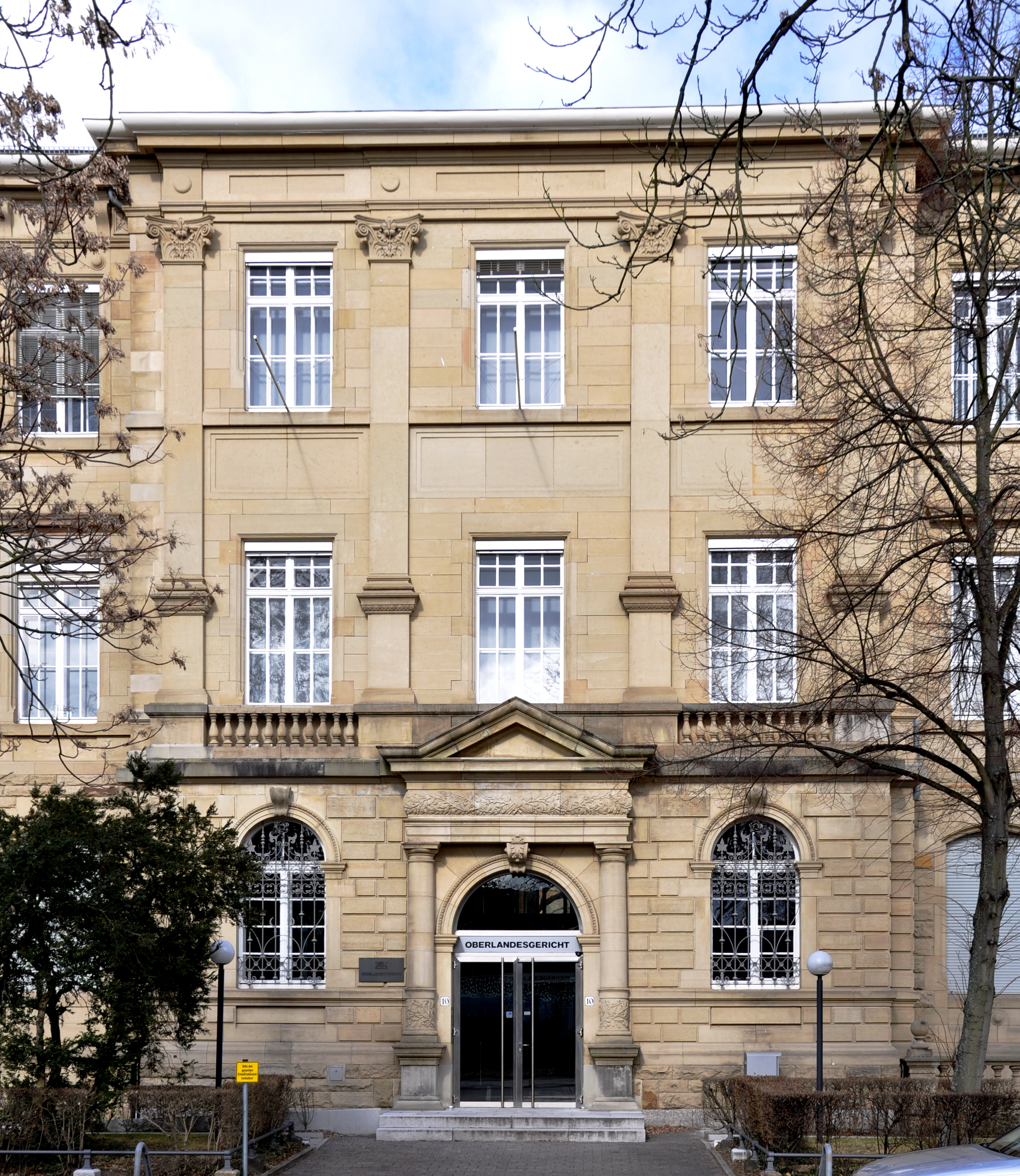 Oberlandesgericht Karlsruhe in der Karlsruher Weststadt